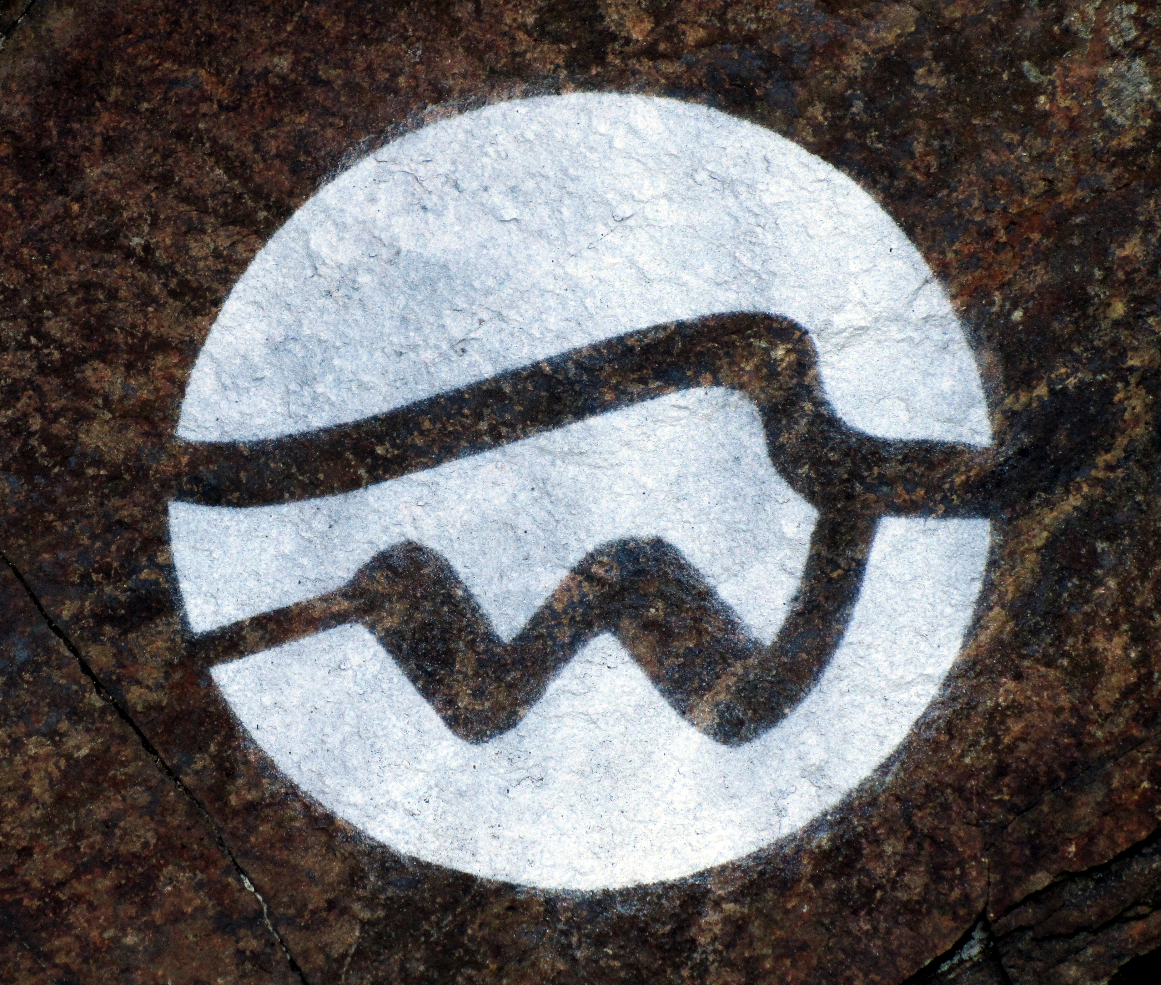 Markierung des Wanderwegs "Welterbesteig" in der Wachau, Österreich